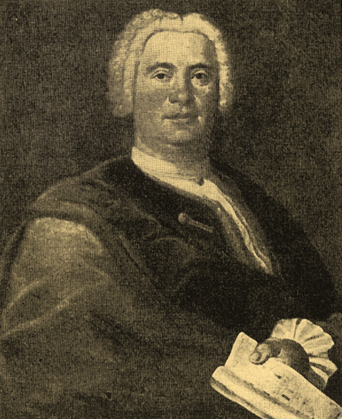 Портрет на якому зображено 47-річного мужчину, 3/4, en face. Одягнений у плащ, в лівій руці тримає проєкт - він архітектор. Обличчя овальне і повне, ніс лед задертий, чоло високе. Волосся заховане під перукою.